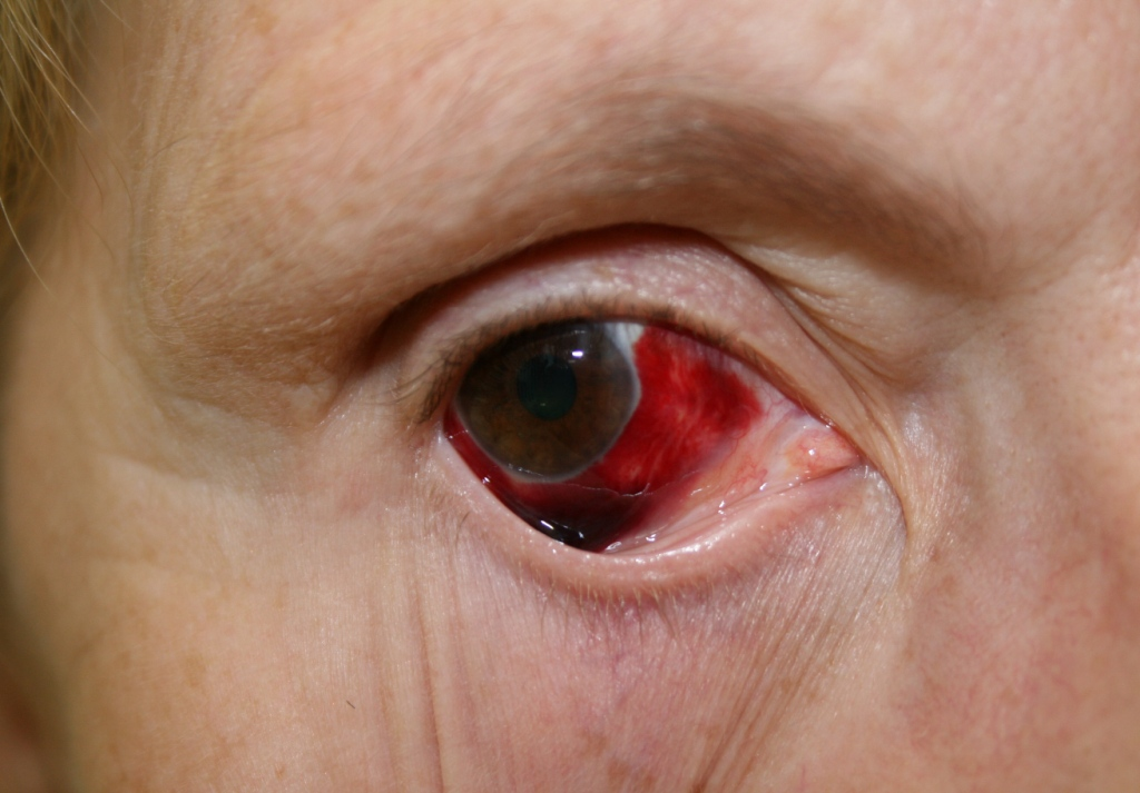 Hypospagma: Blutung unter die Augenbindehaut